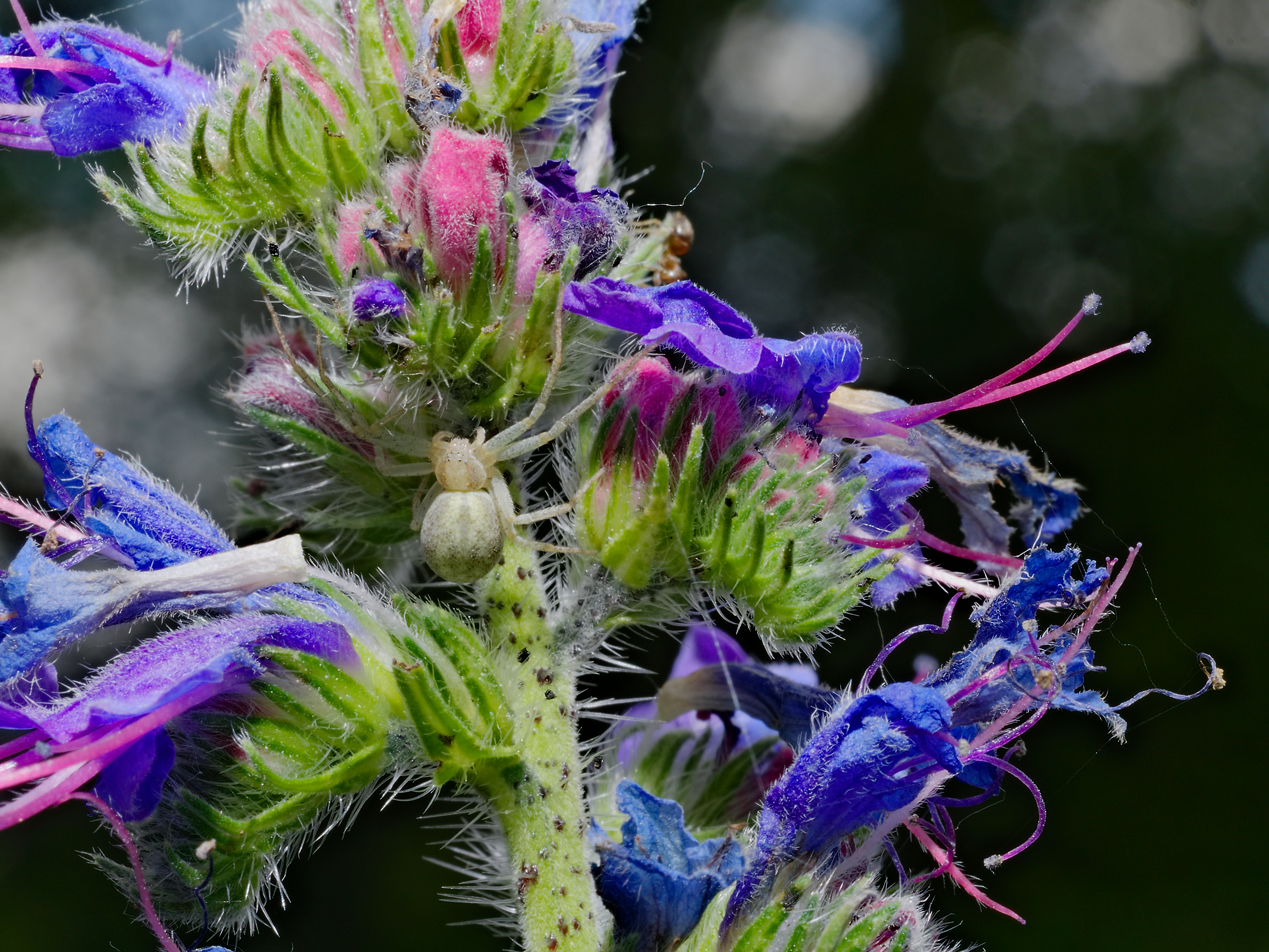 Blauer Natternkopf - Echium vulgare. Aufgenommen am See in Pfingstberg, Mannheim-Rheinau, Baden-Württemberg, Deutschland.